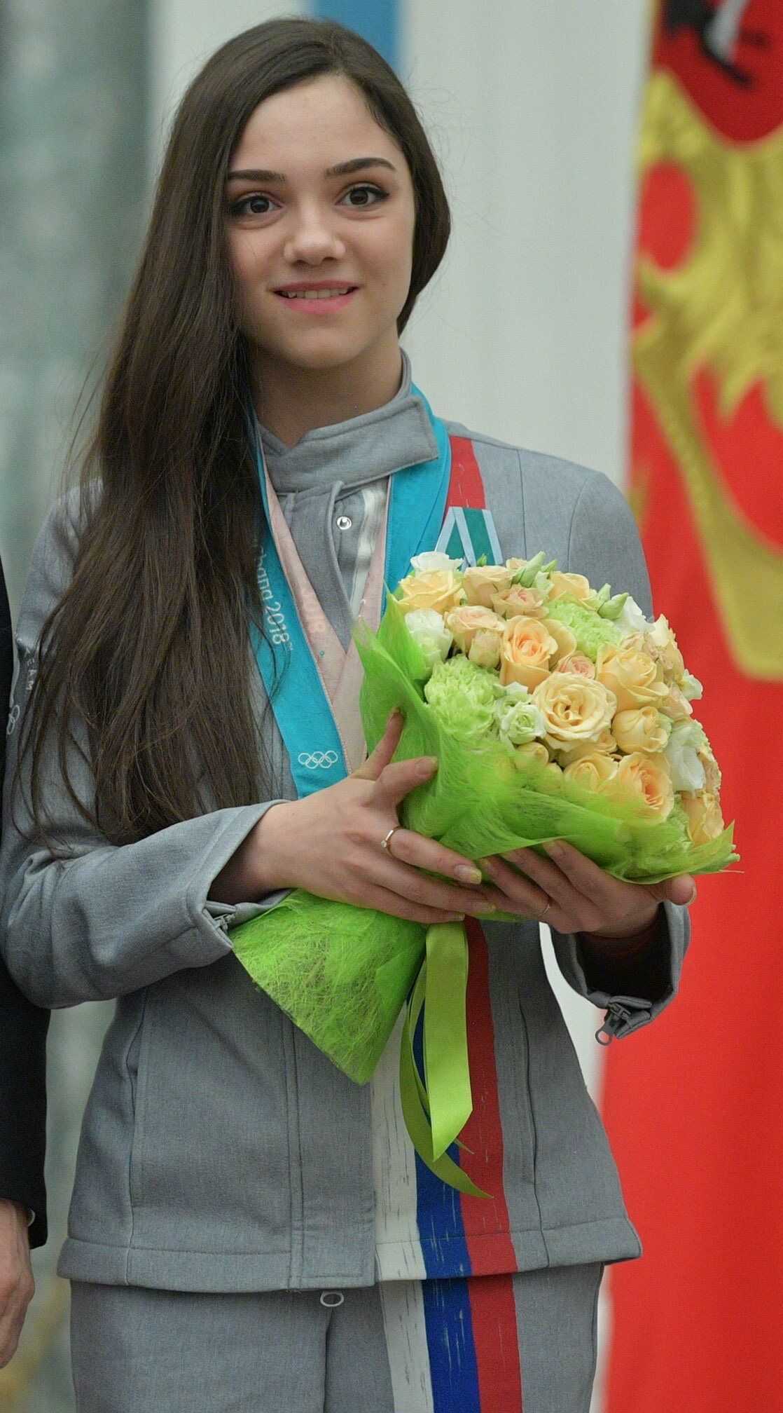 Президент России Владимир Путин с серебряным призёром Игр по фигурному катанию на коньках Евгенией Медведевой